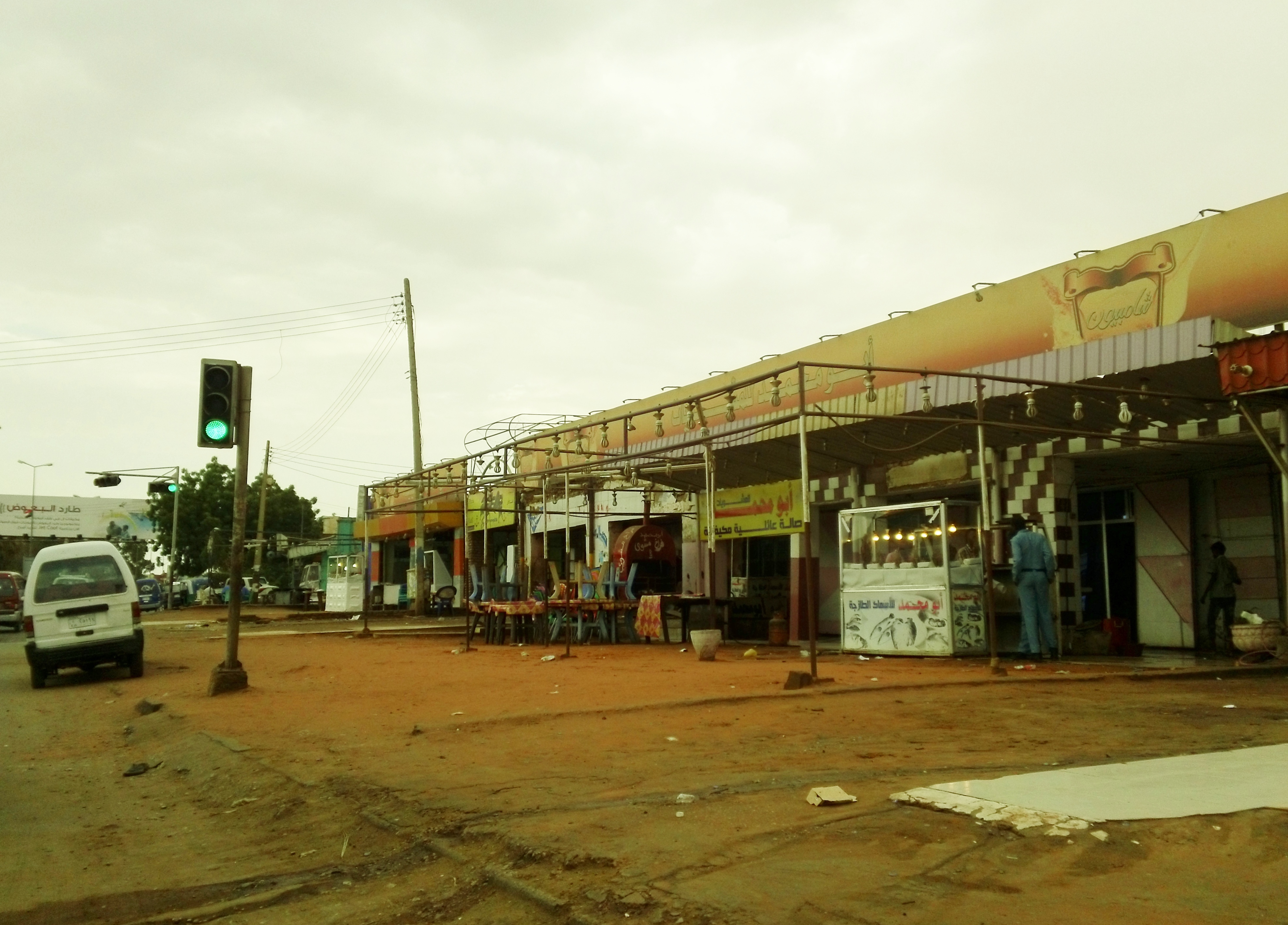 Almoradah market - Almoradah Street - Omdurman - Sudan